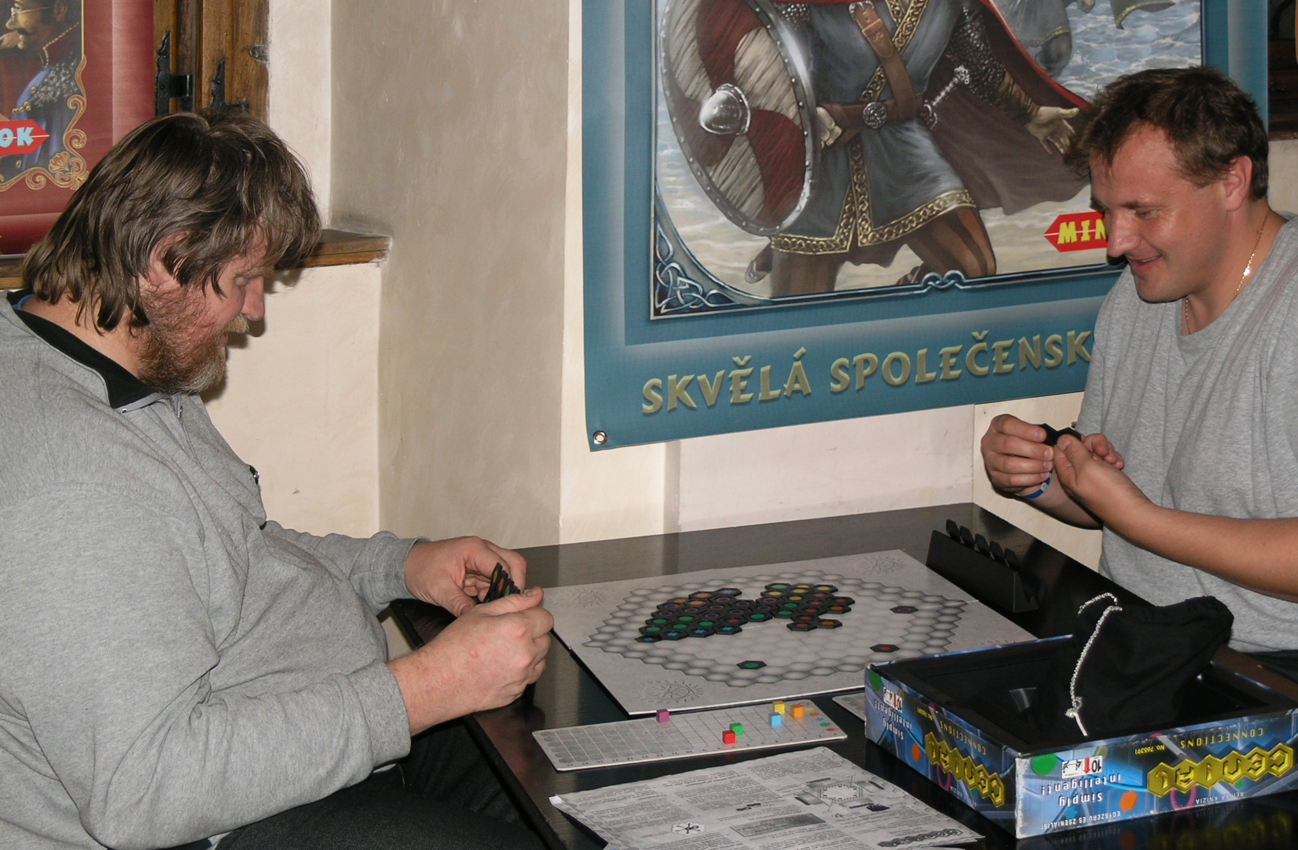 Česky: Deskohraní 2008 - Einfach genial